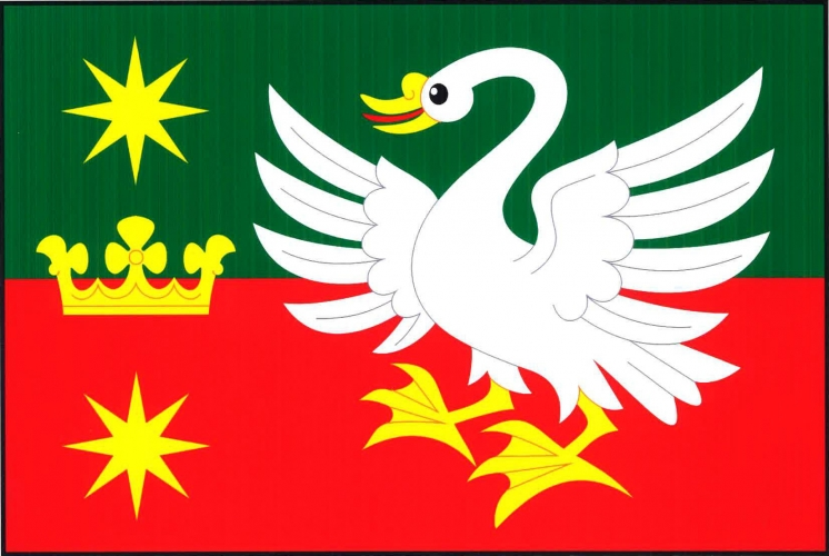 vlajka, Chudenín, okres Klatovy